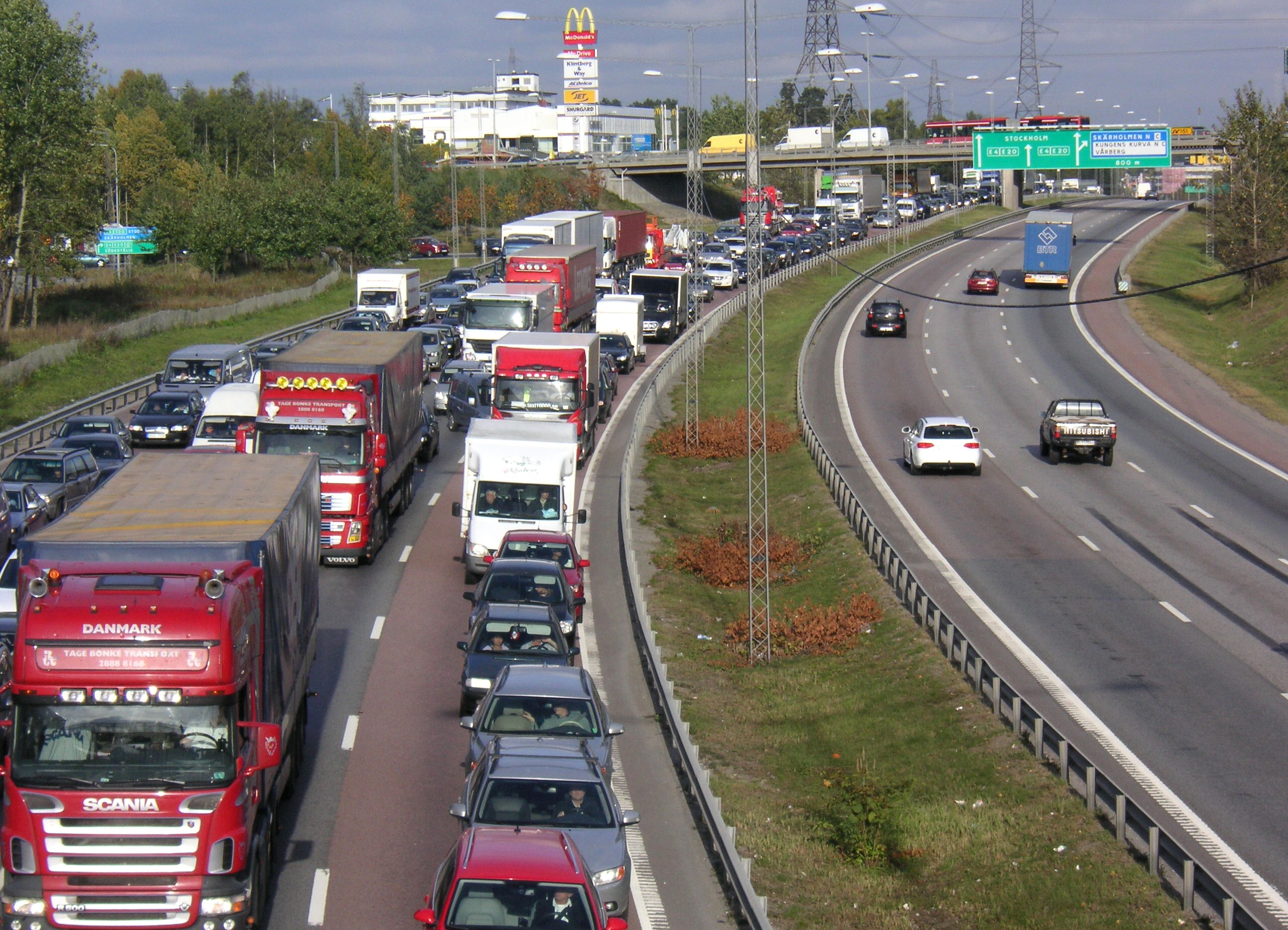 Kö på Södertäljevägen söderut efter olycka i Vårby